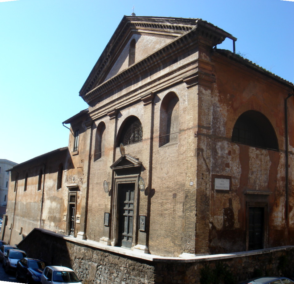 Roma, san Giovanni decollato a Ripa